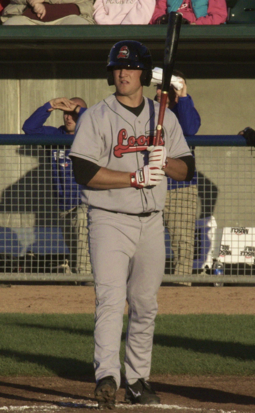 Scott Schebler